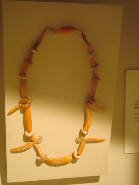 Collar de conchas marinas de la cultura nicoyana. Museo del Jade. Costa Rica.